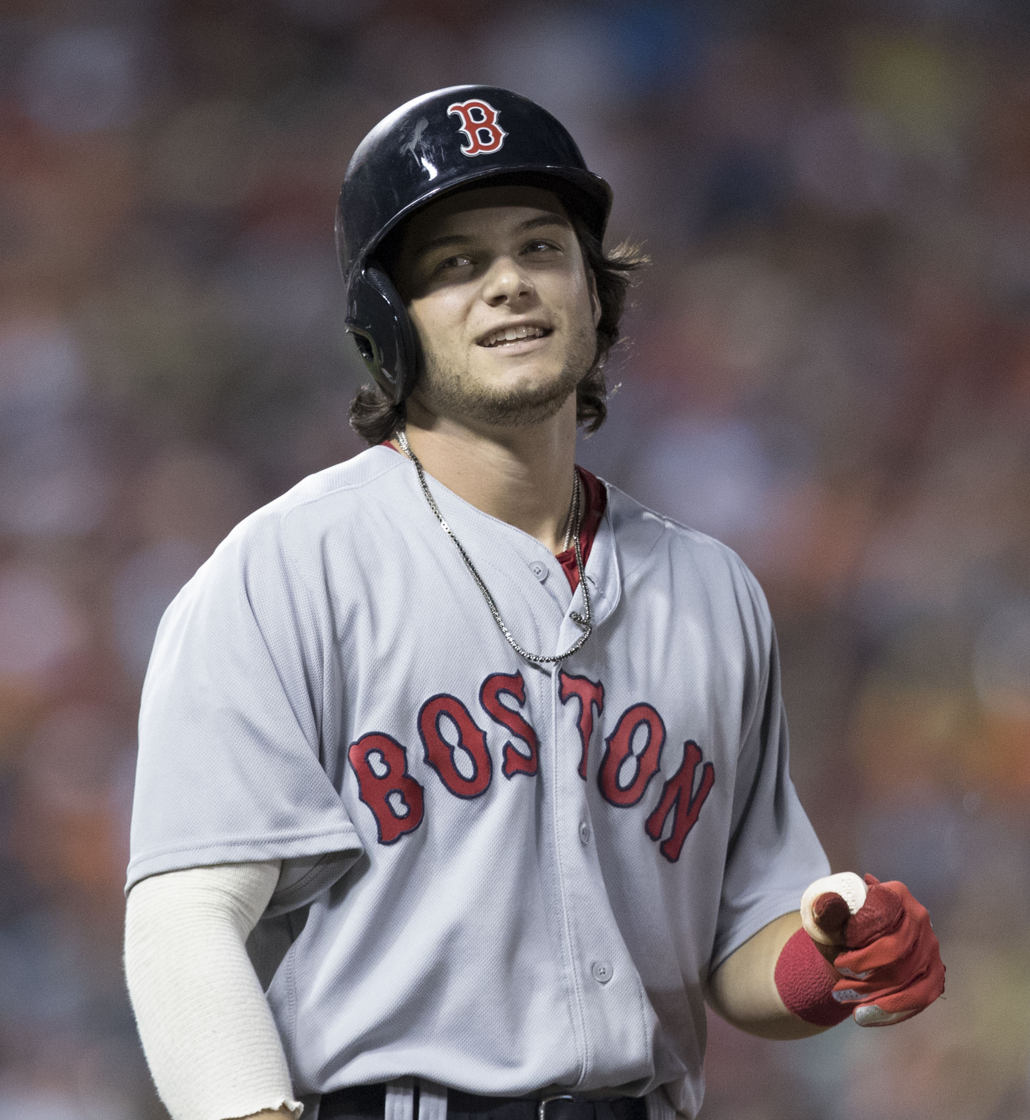 Andrew Benintendi